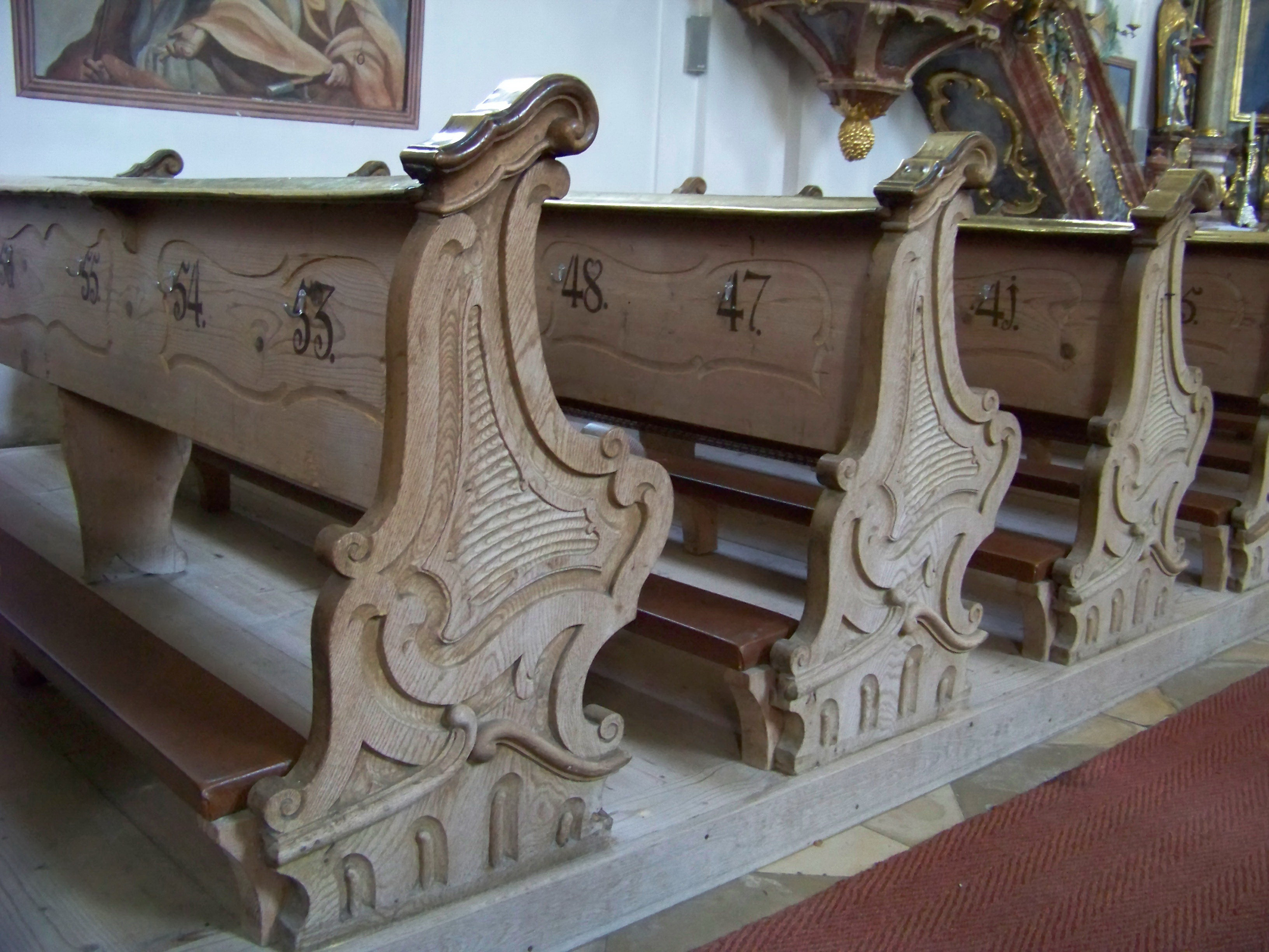 Unterneuhausen, Kirchweg 9. Saalkirche mit Westturm, barocke Anlage von 1741, mit Lisenengliederung. Schwungvoll geformte barocke Stuhlwangen mit einfachem Schnitzwerk. Sogar die Rückseiten der Lehnen, an denen die Platznummern angebracht sind, sind mit Ornamenten verziert.